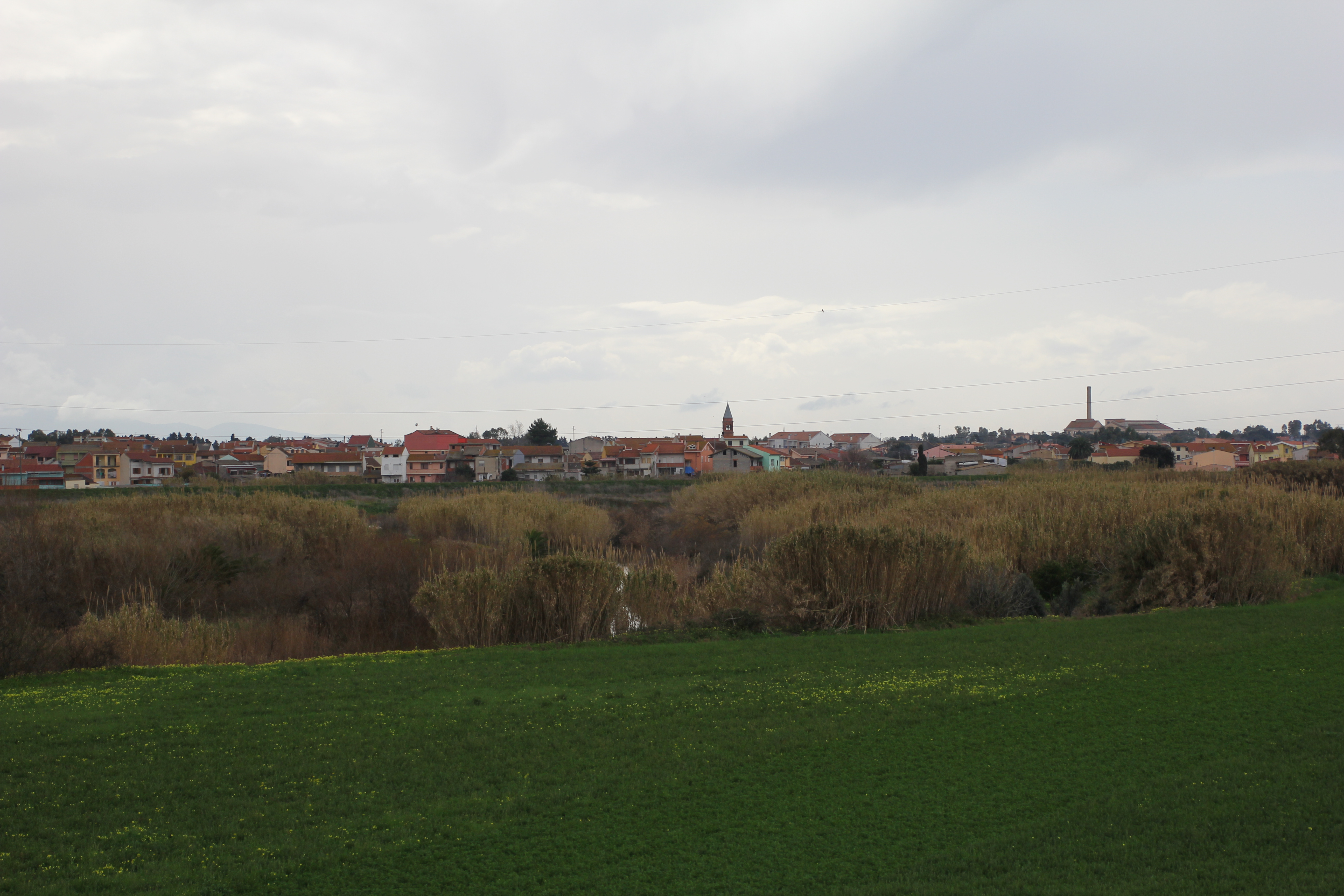 Marrubiu, comune della Sardegna